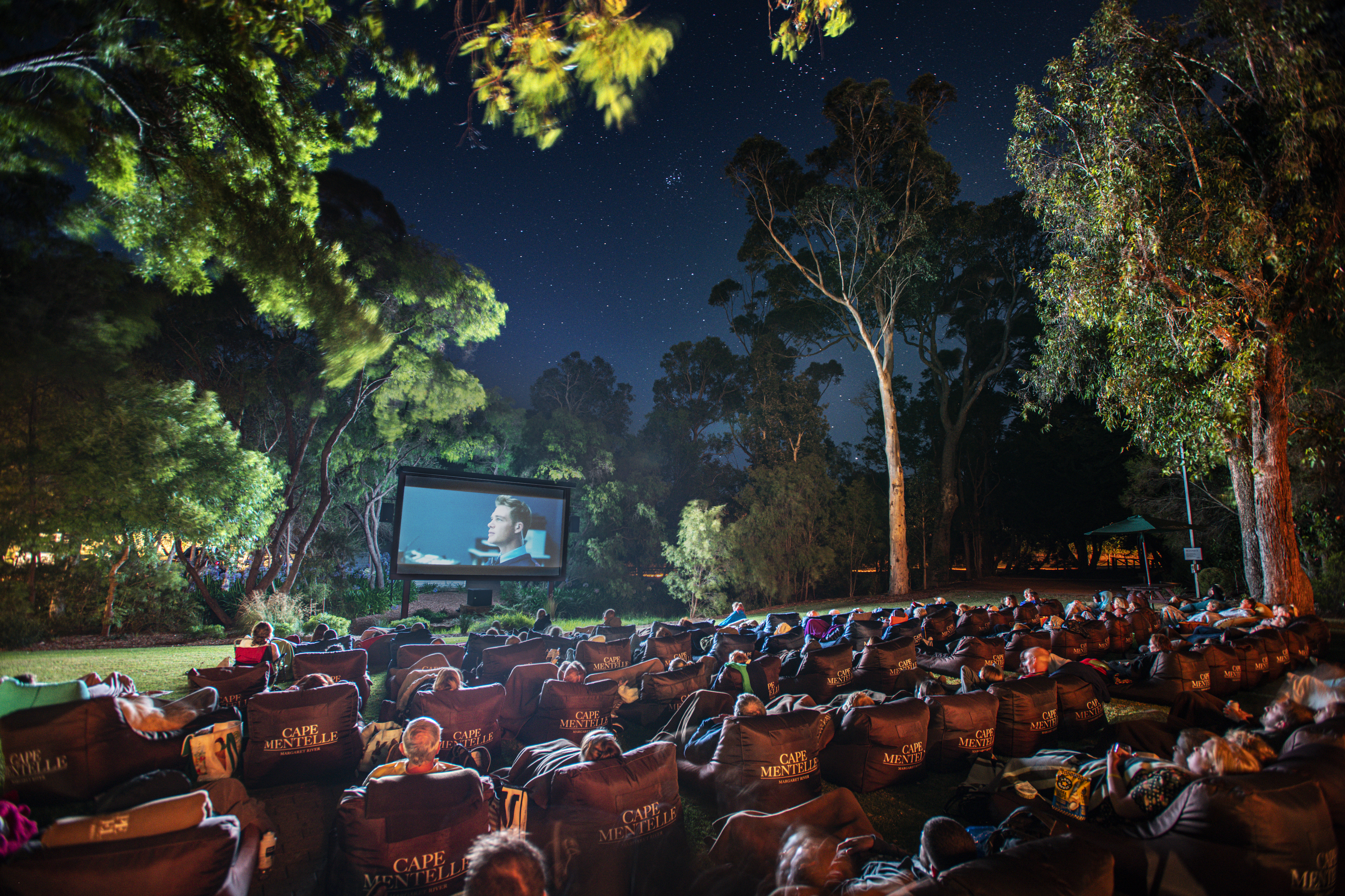 © 2020 Copyright Cape Mentelle